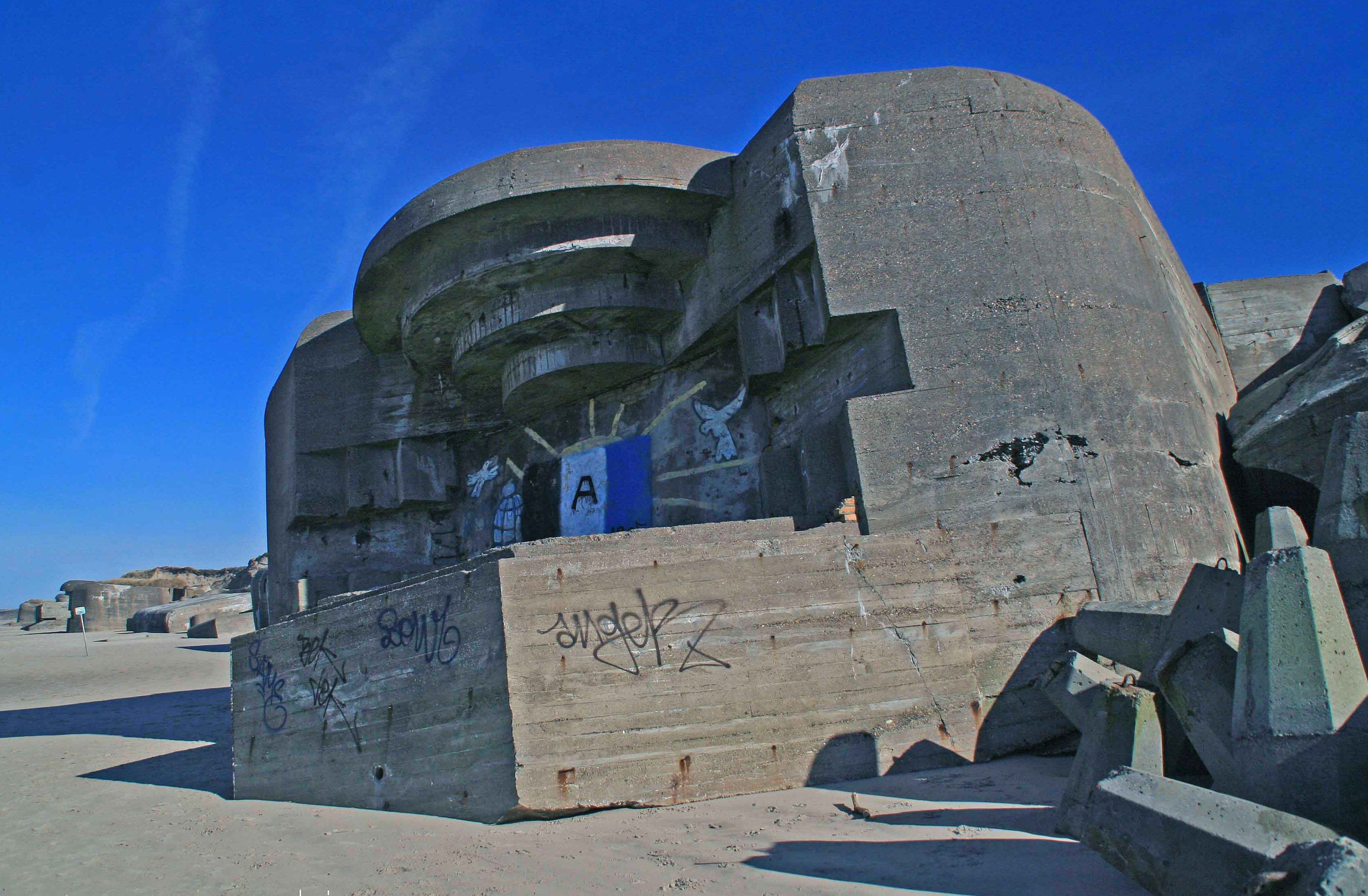 tyskerbunkers på løkken strand